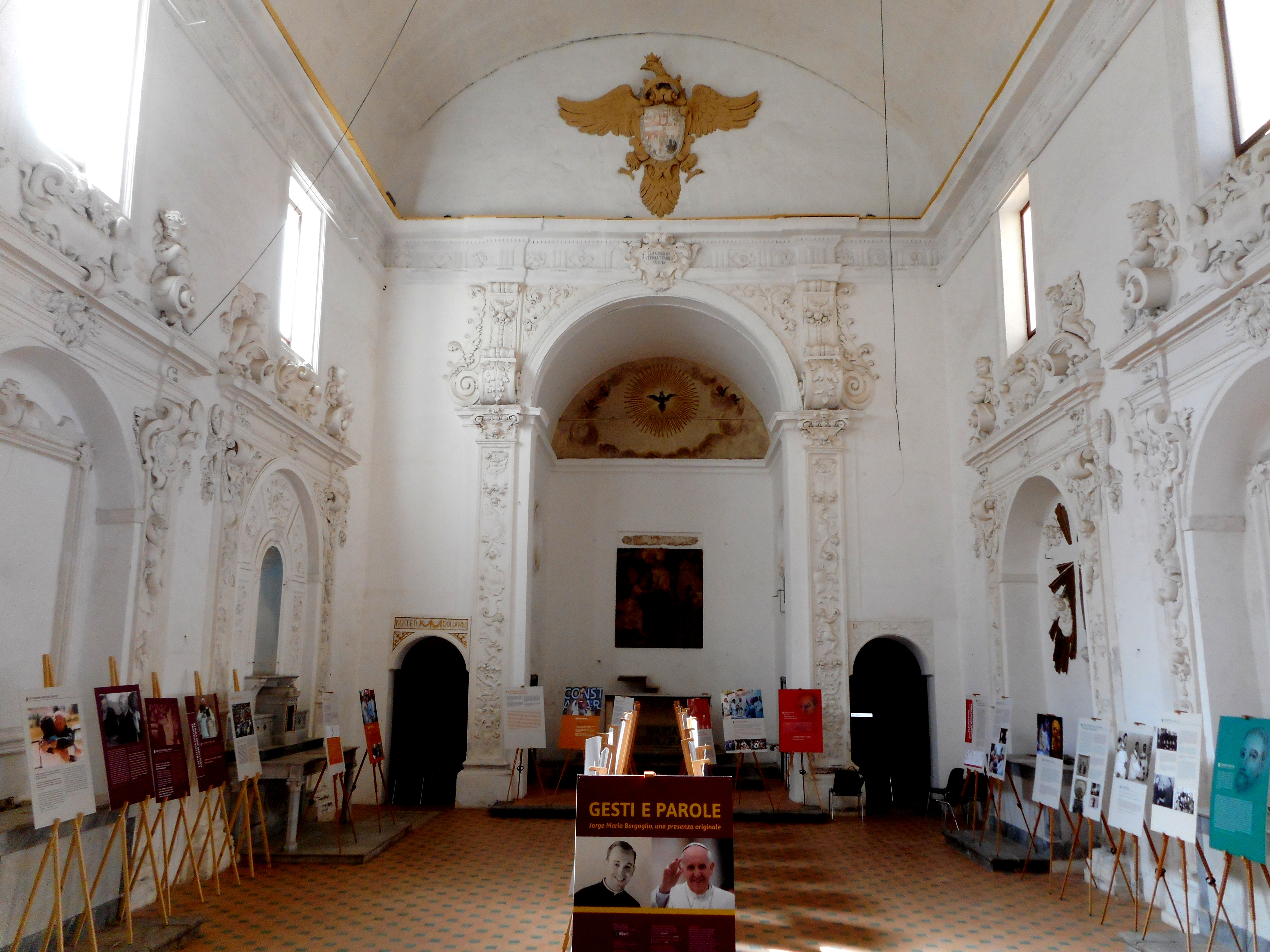 Interno della chiesa di Santa Maria dell'Itria alla Pinta